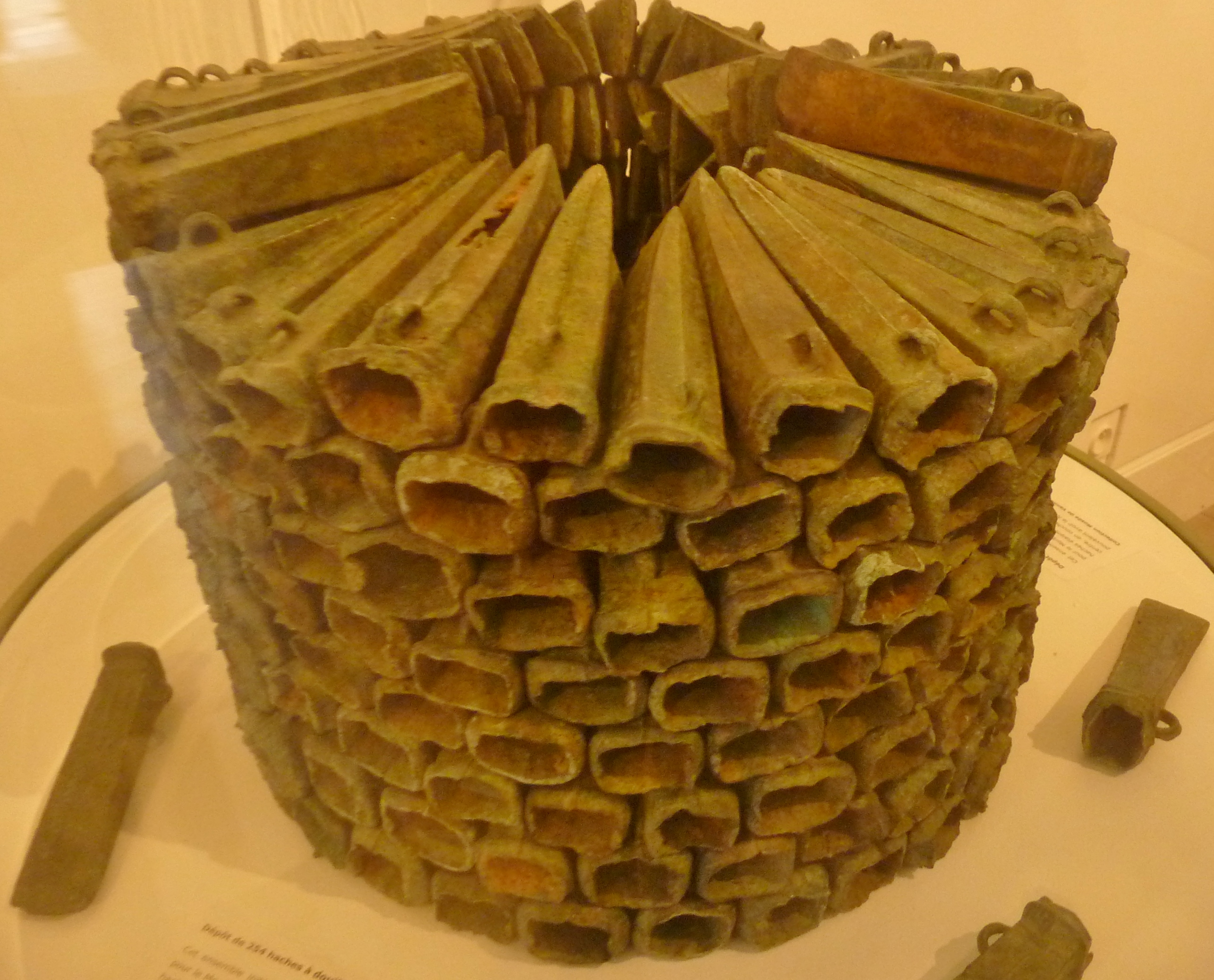 Le dépôt de haches à douille de Langonnet, composé de plus de 300 haches à douille, a été trouvé en 1976. Les haches à douille servaient probablement de lingots monétaires. La photo représente une partie d'entre elles déposées au Musée d'histoire et d'archéologie de Vannes.